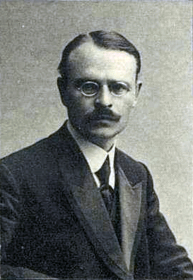 Ефим Григорьевич Колбинцев (18 января 1875, Оренбургская губерния — после 1917) — крестьянин, казначей, торговец, депутат IV Государственной думы от Оренбургской губернии (1912—1917).